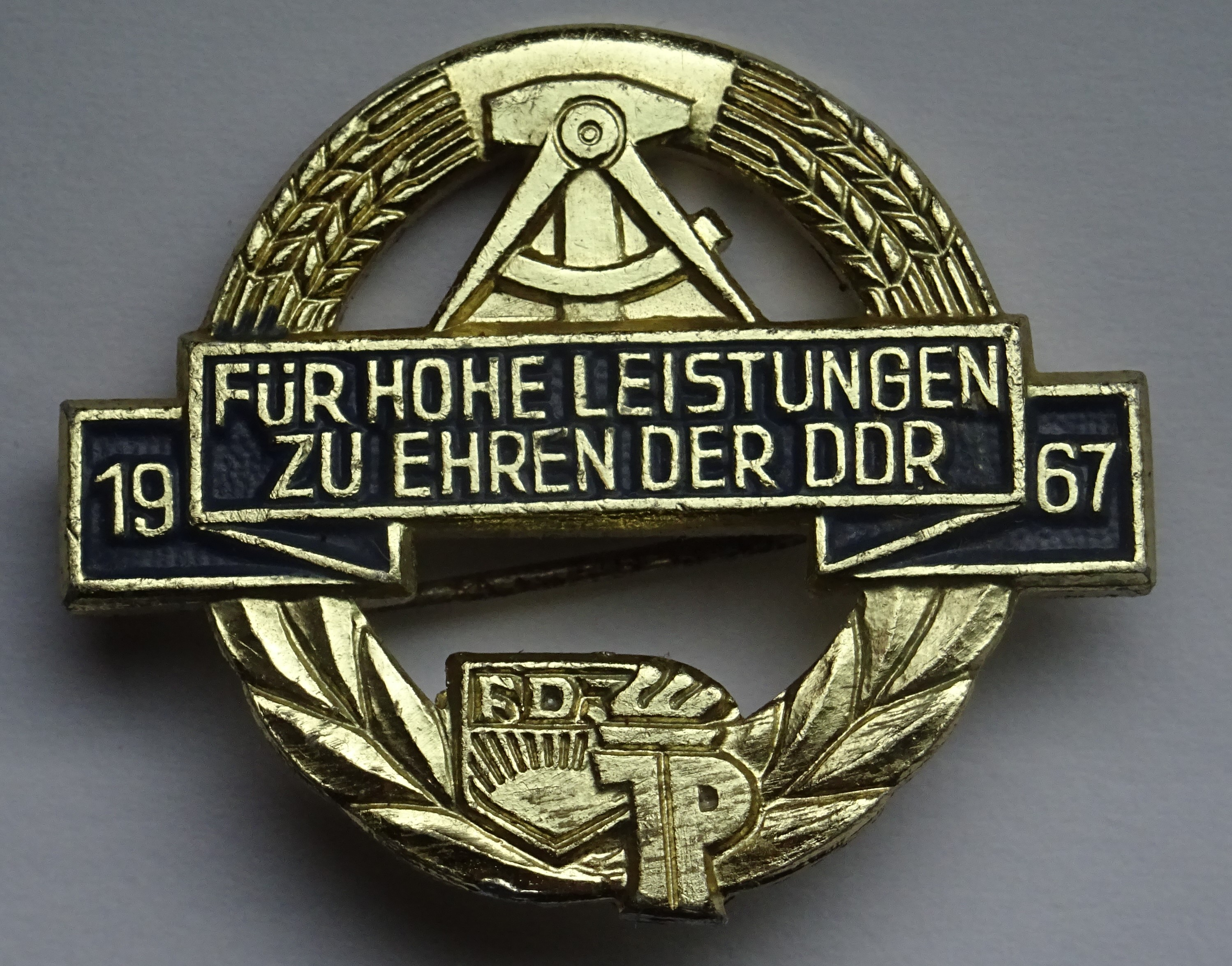 Abzeichen der Freien deutschen Jugend (DDR) "für hohe Leistungen zu Ehren der DDR", 1967